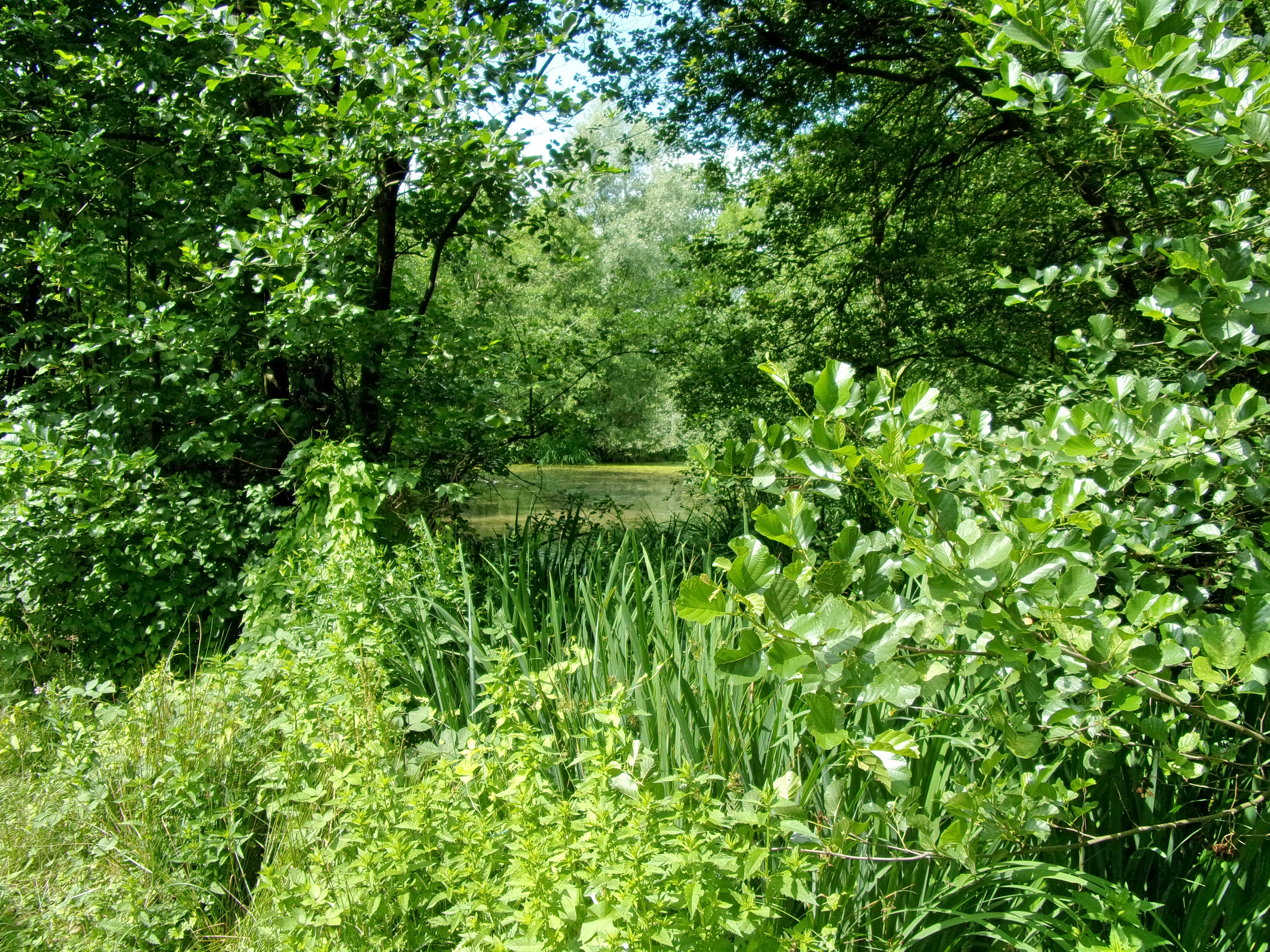 Der Wilhelmsburger Rathauspark befindet sich hinter dem Behördenparkplatz des heutigen Kundenzentrums des Bezirksamtes an der Mengestraße 19. Sehr versteckt führt links am Kundenzentrum ein ungepflegter und nicht ausgeschilderter Weg auf eine kleine Freifläche mit sehr alten Bäumen und einem kleinem Biotop mit üppiger Vegetation rund ums Ufer. Es gibt weder Wege noch Bänke, die Freiflächen sind gepflegt und kurz gehalten, die Uferzonen rund um die kleine Wasserfläche sind wichtiger Lebensraum für Tiere und Pflanzen.